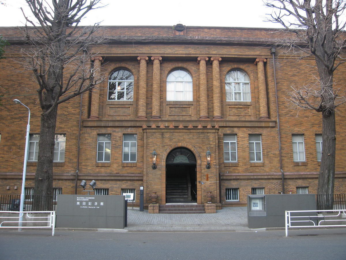 黒田清輝 - 黒田記念館(東京都台東区上野公園)